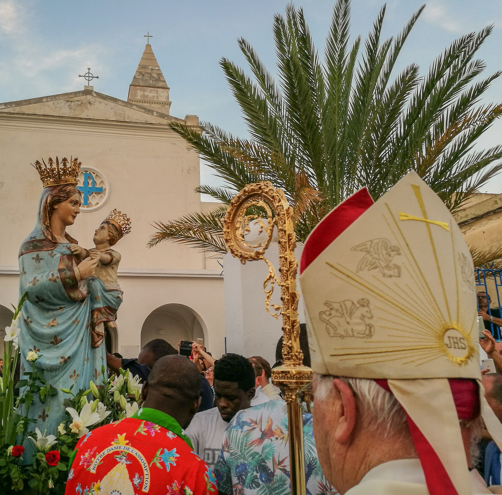 Premiere Assomption du 15 Août de la vierge de Trapani à la Goulette depuis 1960